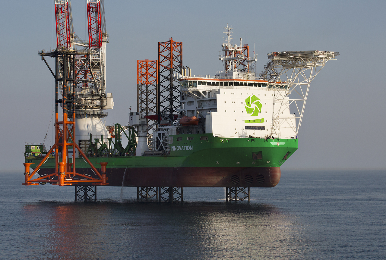 Innovation